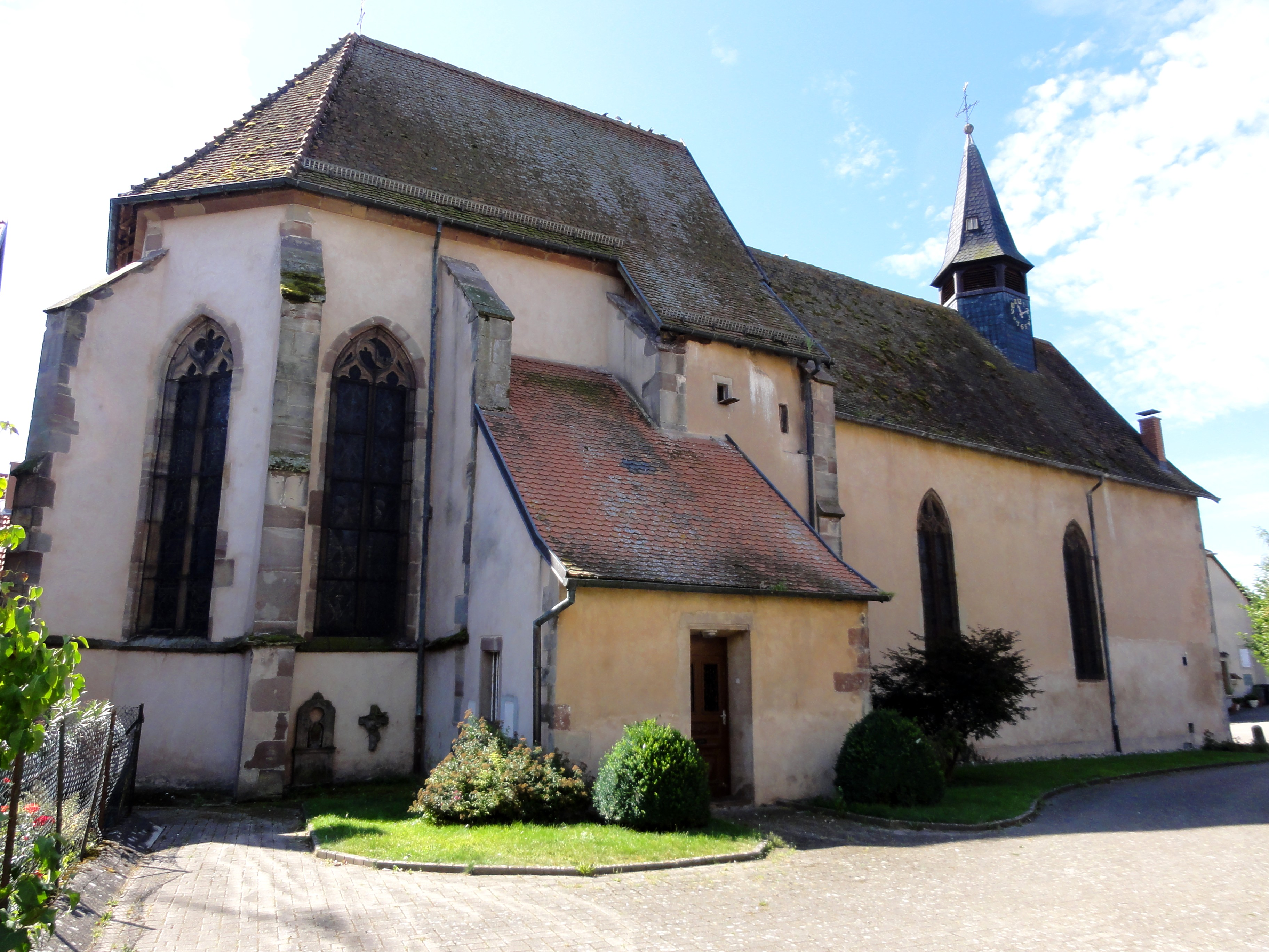 Alsace, Bas-Rhin, Sarrewerden, Église Saint-Barthélemy (ancienne Collégiale Saint-Blaise) (PA00084945, IA67005982): Façade nord.